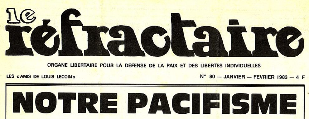 Dernier numéro de la revue Le Réfractaire, organe libertaire pour la défense de la paix et des libertés individuelles », fondé par May Picqueray